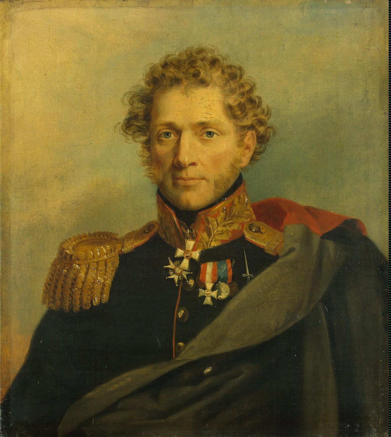 Ludwig von Wallmoden-Gimborn (1769 -1862), Russian and Austrian general